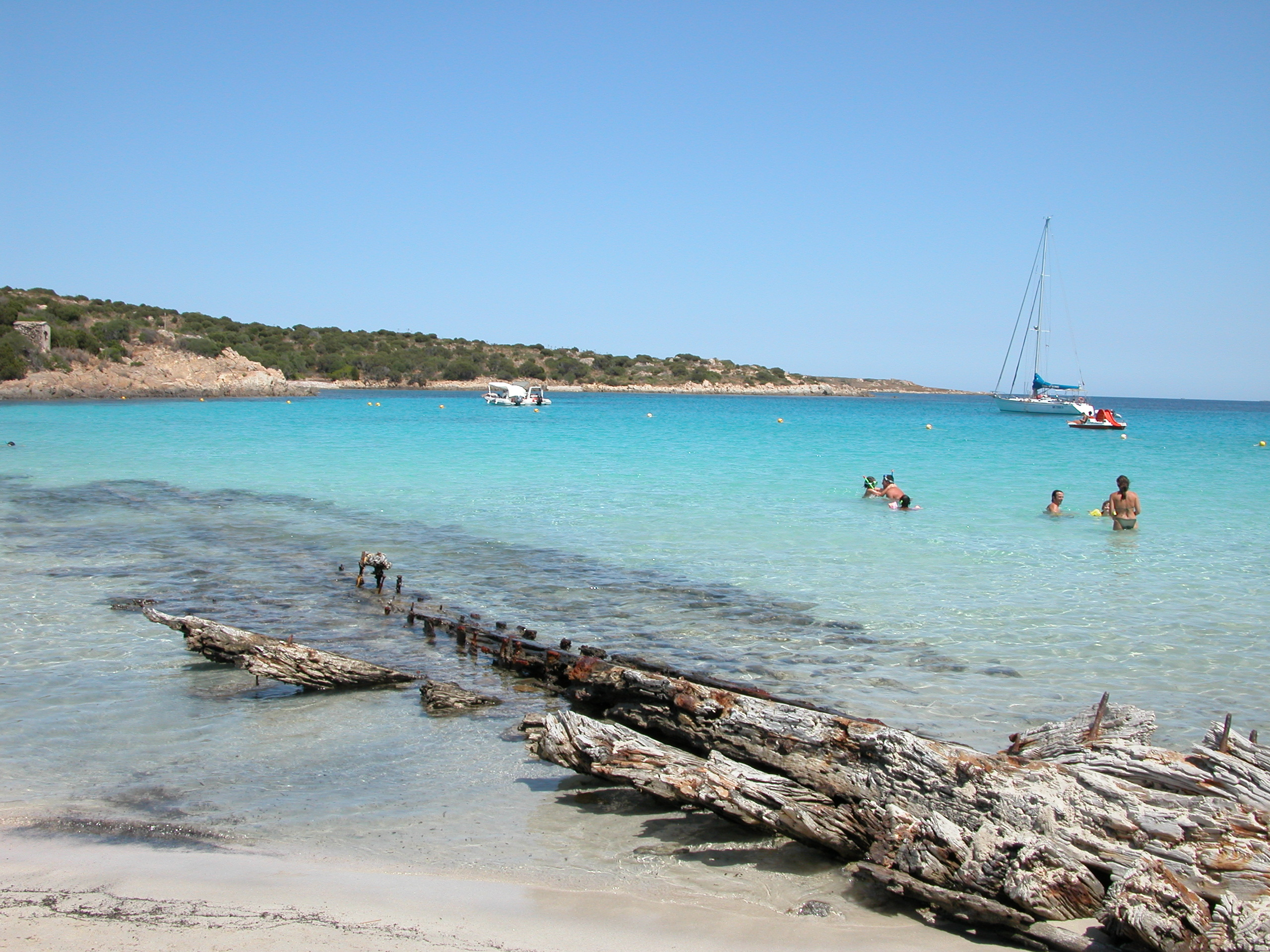 Spiaggia del relitto